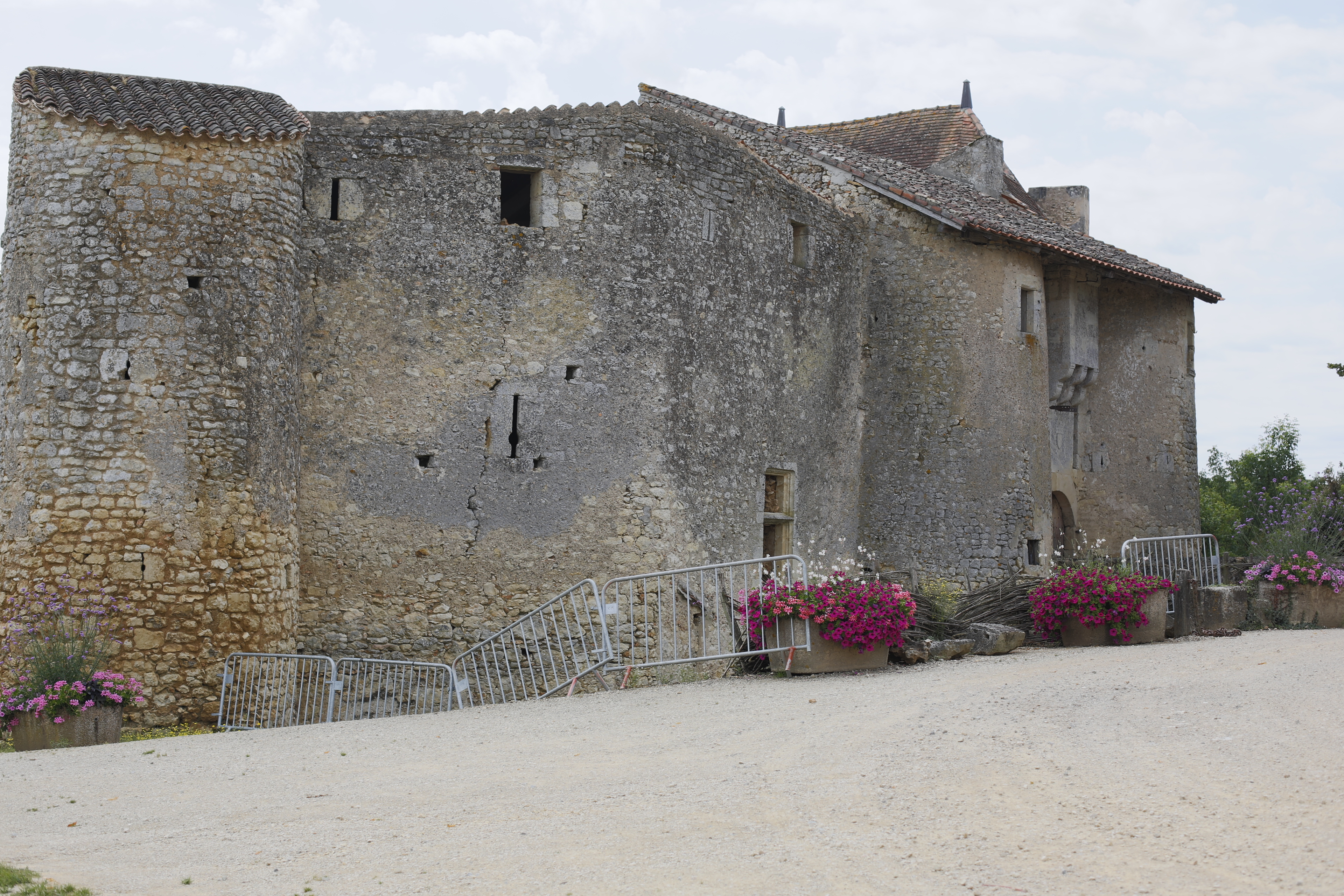 Château de Chiré-en-Montreuil : le logis